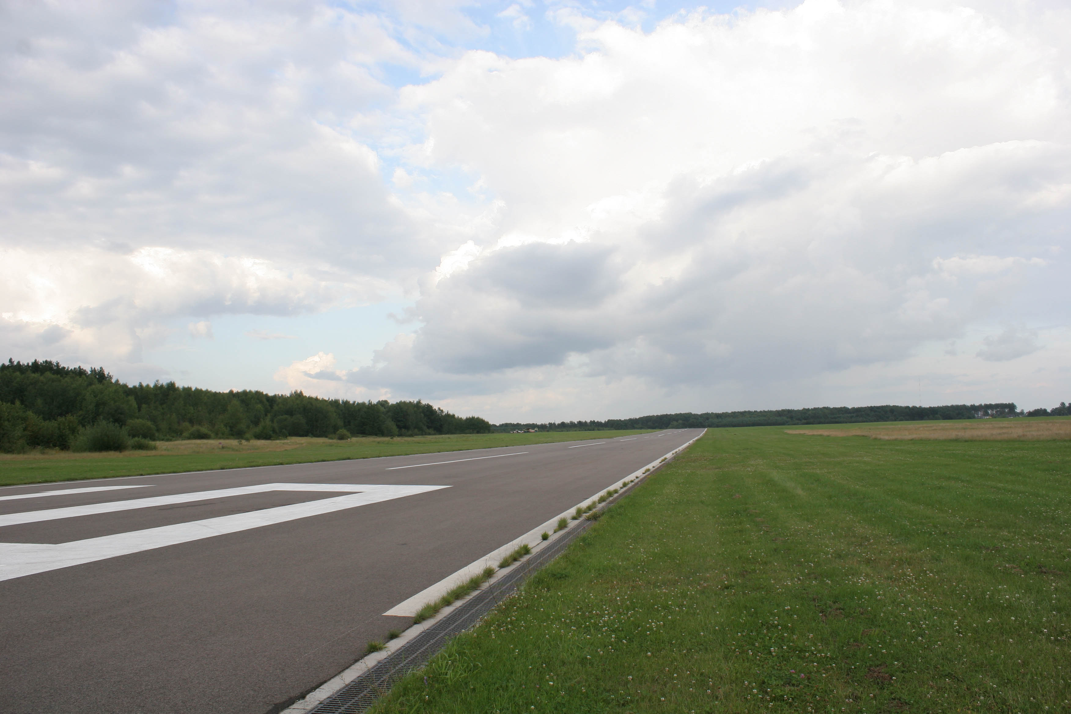 Utwardzony pas startowy na Lotnisku Dajtki